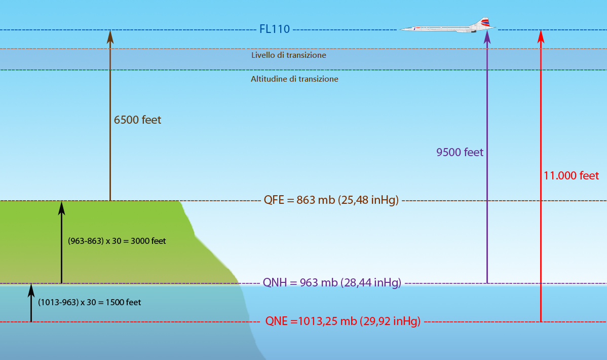 Traduzione in italiano delle didascalie